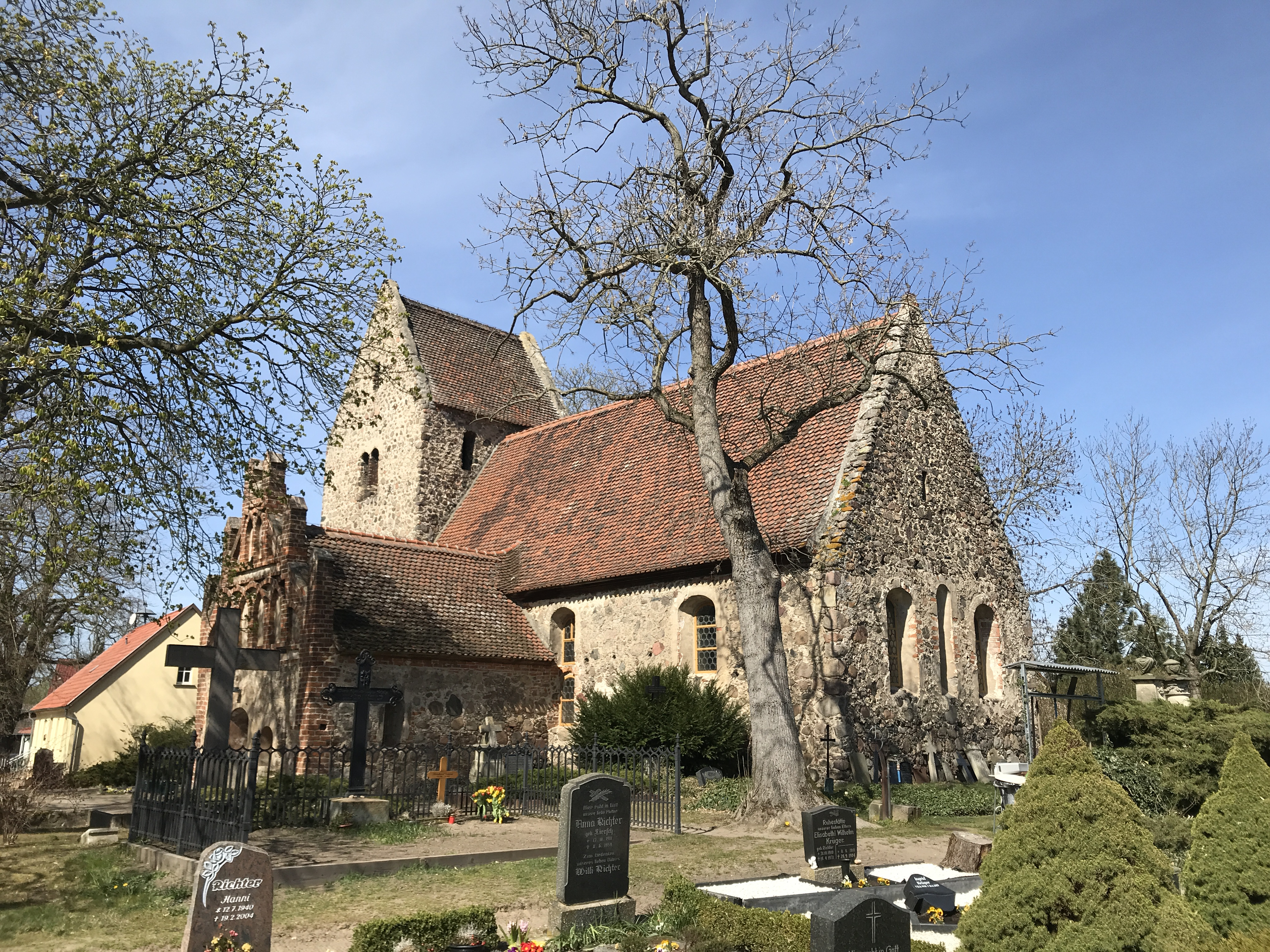 Die Dorfkirche Zaue ist eine spätromanische Feldsteinkirche in Zaue, einem Gemeindeteil von Ressen-Zaue der Gemeinde Schwielochsee im Landkreis Dahme-Spreewald. Im Innern hängt unter anderem ein Taufengel, den Tobias Mathias Beyermann im Jahr 1720 schuf.